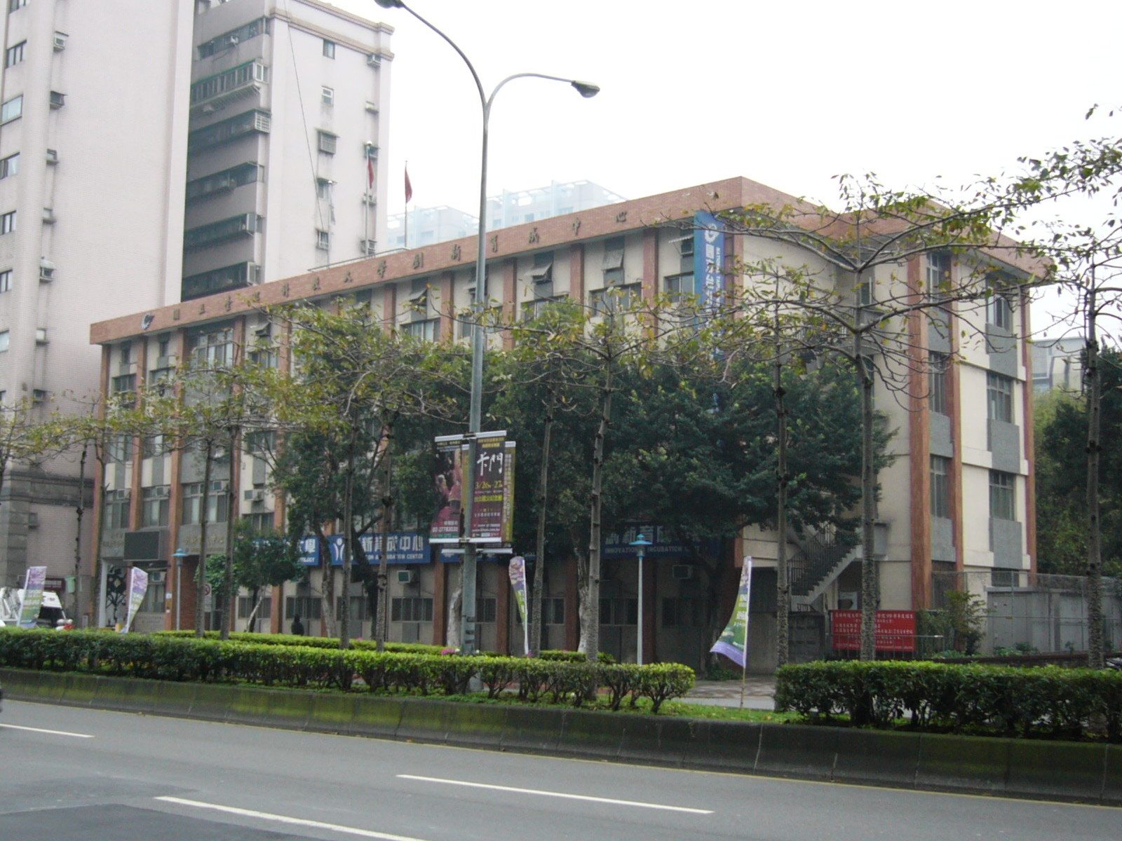 中文（台灣）: 國立臺北科技大學創新育成中心，原學生宿舍，位於臺北市大安區忠孝東路三段，現已拆除。